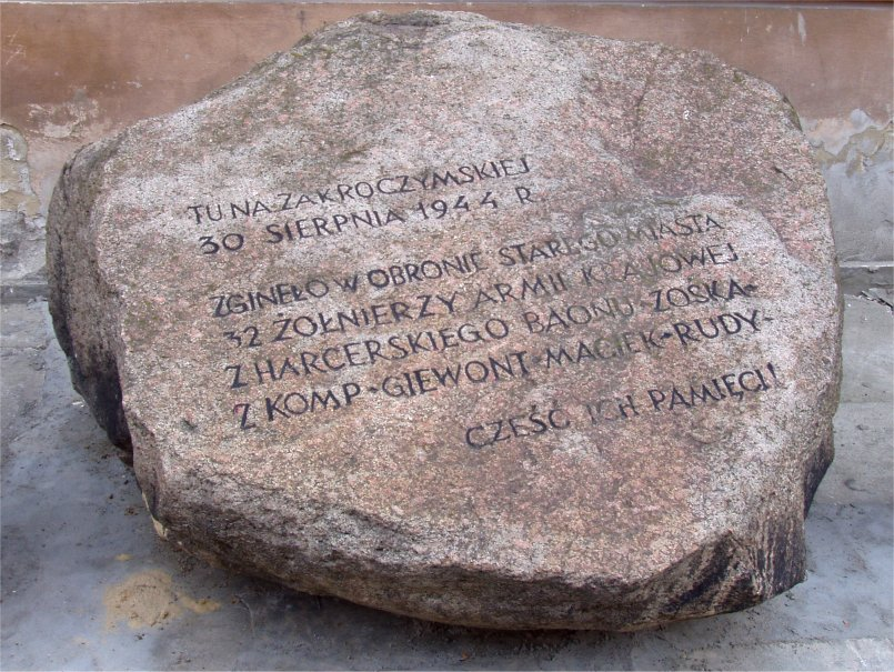 Obelisk na ul. Zakorczymskiej w Warszawie (fot Zu)